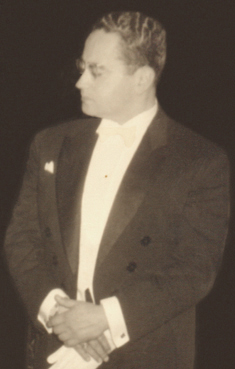 António Abranches de Soveral (1913-2003) ; Portugal ; Século XX / 20TH Century ; Advogado / Lawyer ; Deputado / Member of Parliament